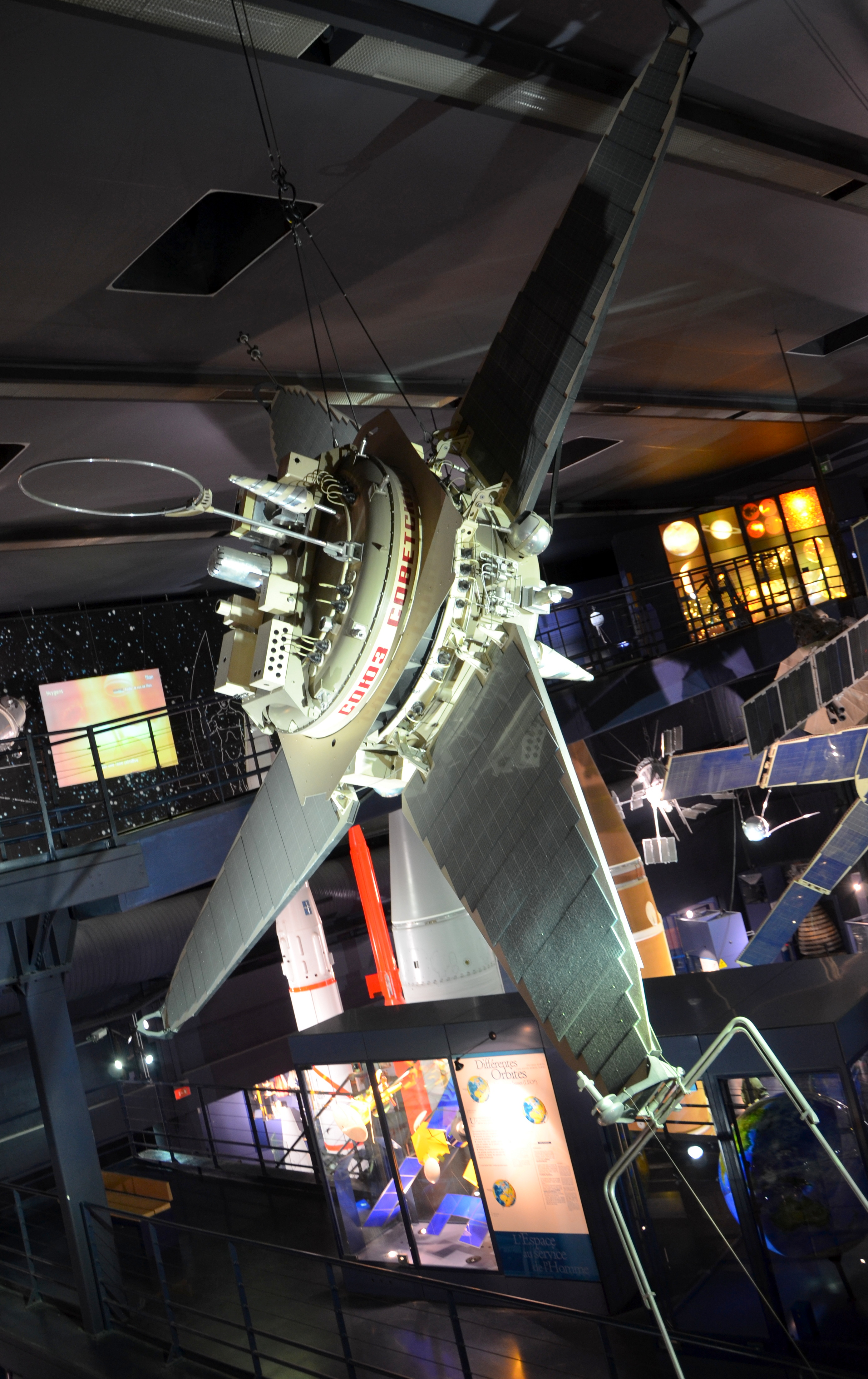 Maquette à l'échelle 1 du satellite scientifique soviétique Prognoz 2 lancé en 1972 au Musée de l'Air du Bourget, Île de France, France